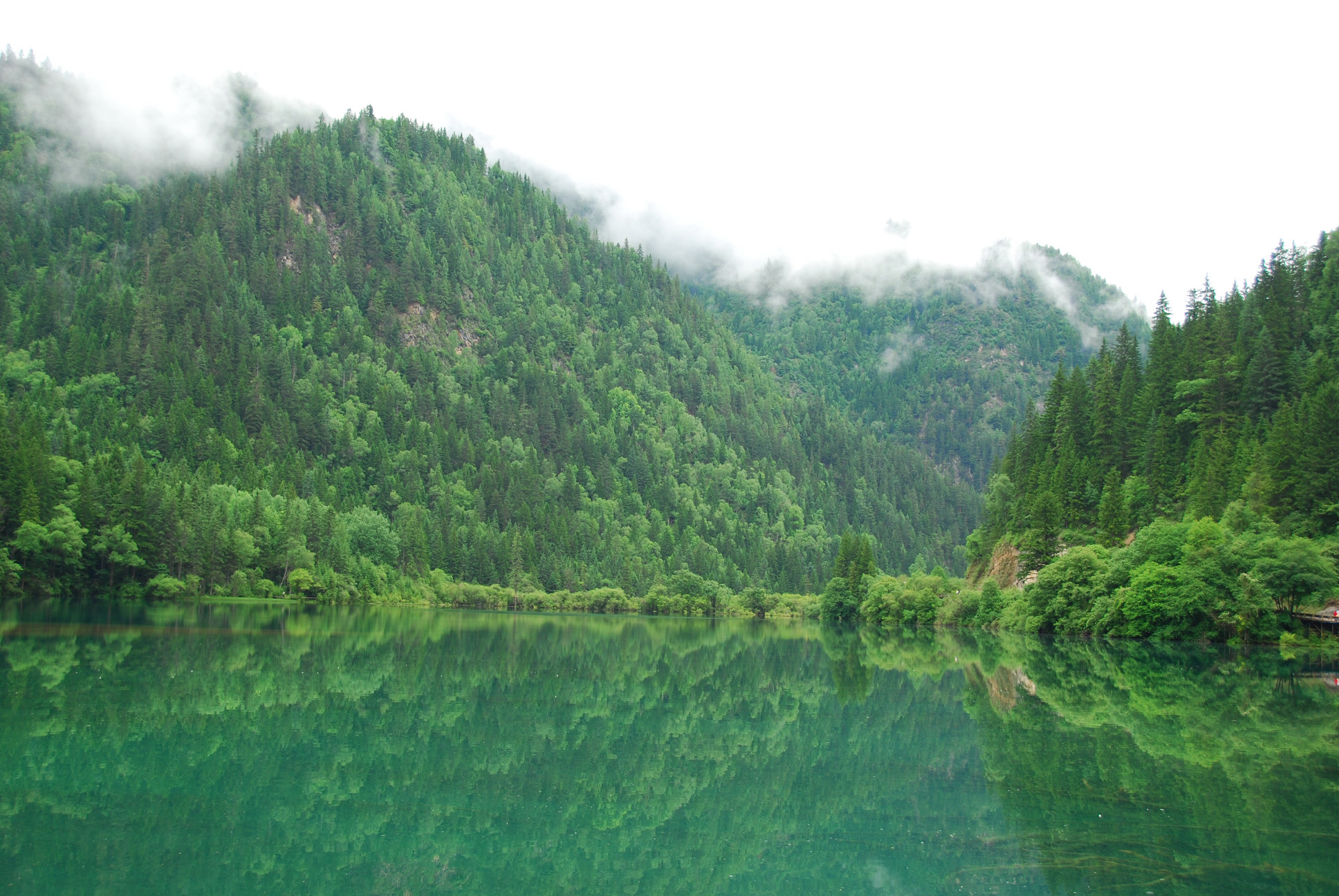 Jiuzhaigou, Aba, Sichuan, China